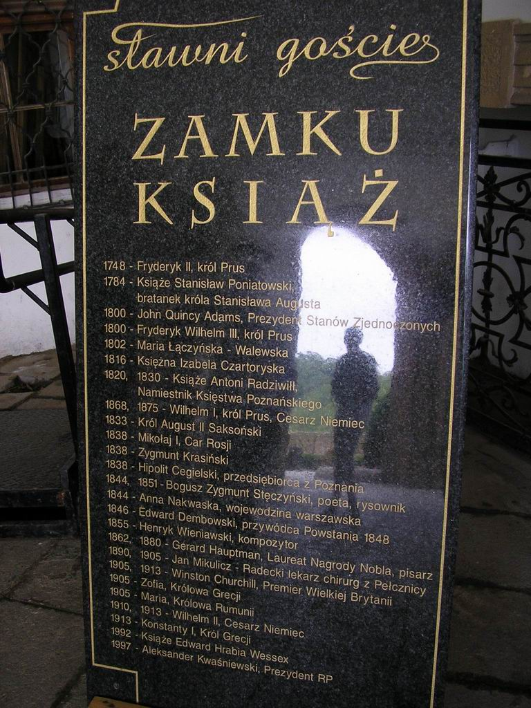 Famous guests (Ksiaz)